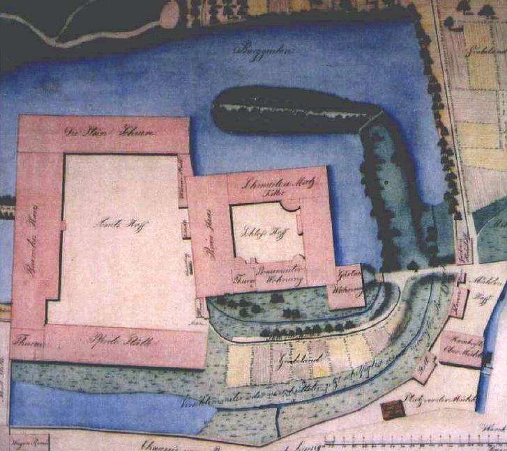 Schloss Hessen mit blau gefärbtem Wassergraben, links die Unterburg mit Amtshof, oben: Steinscheune, links: Beamtenhaus, unten: Pferdestall und Turm, rechts die Hauptburg mit Schlosshof mit Turm, Braumeisterwohnung, Bierhaus und Gärtnerwohnung im Anbau, Beschriftung im Nordflügel ist unleserlich